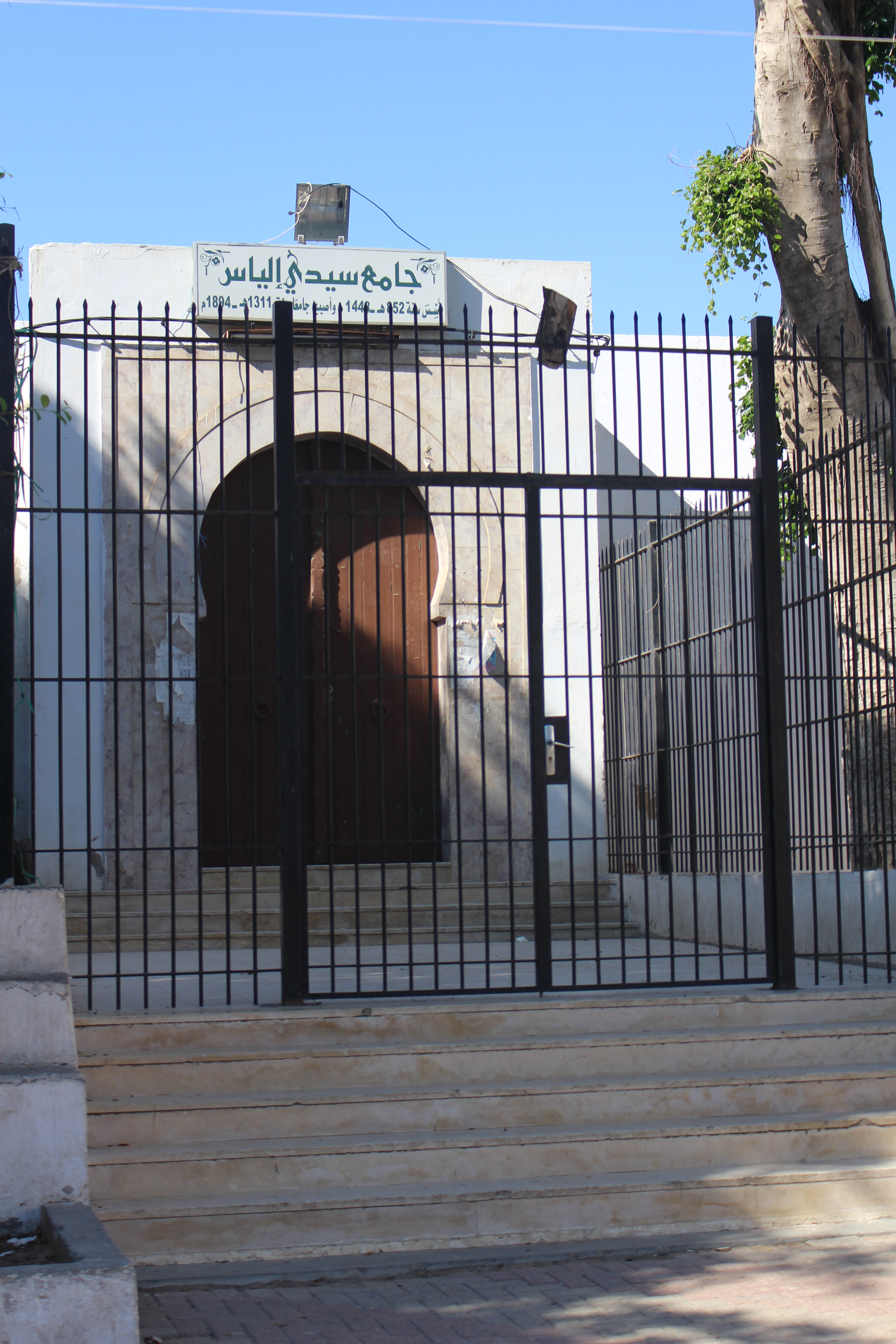 C'est la Mosquée Sidi Elyes de Sfax, une des plus vieilles mosquées de Sfax (Bâtie en 1448/852 de l'Hégire en tant qu'une mausolée, Convertie en mosquée en 1894/1311 de l'hégire). Elle se retrouve à la place de Beb El Kasbah à l'intérieur de la Médina de Sfax.